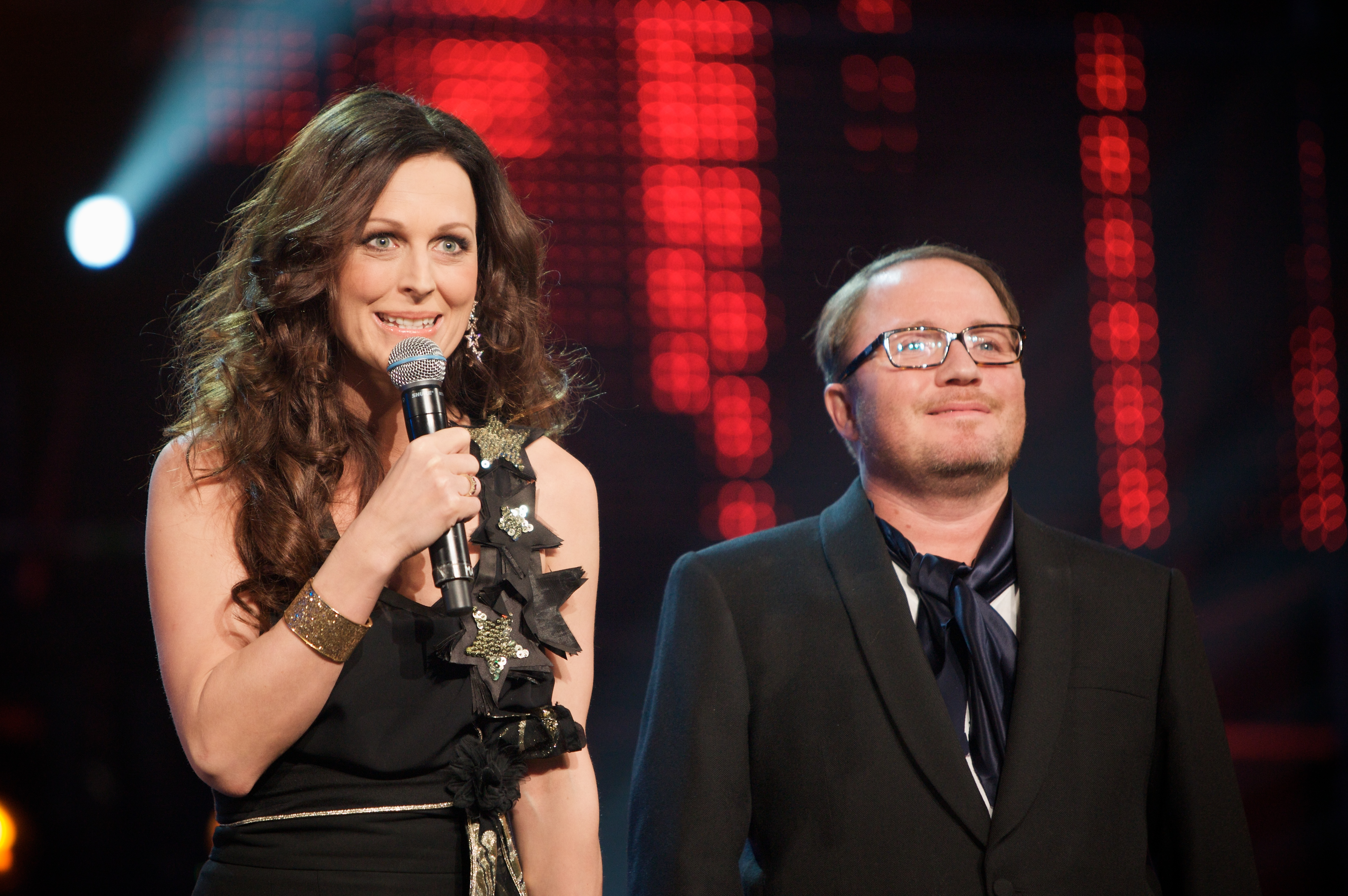 Marte Stokstad og Per Sundnes under MGP 2010 i Skien.